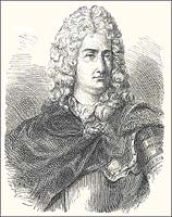 French chemist Charles François de Cisternay du Fay (1698-1739) (aka Dufay)